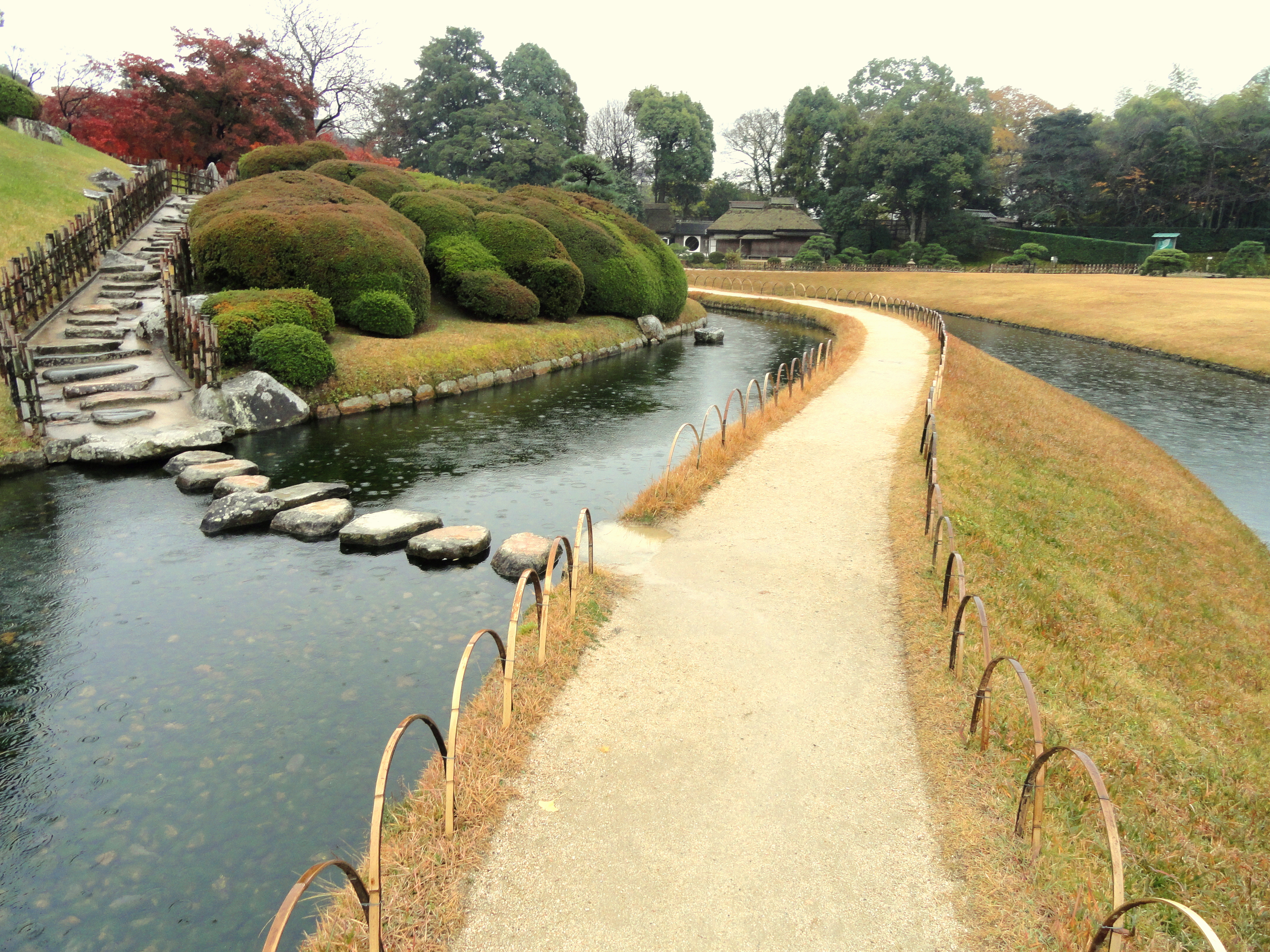 Korakuen, Okayama City, Okayama, Japan.